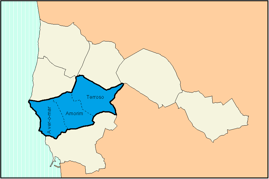 Antigas freguesias constituintes da atual freguesia de Aver-o-Mar, Amorim e Terroso.